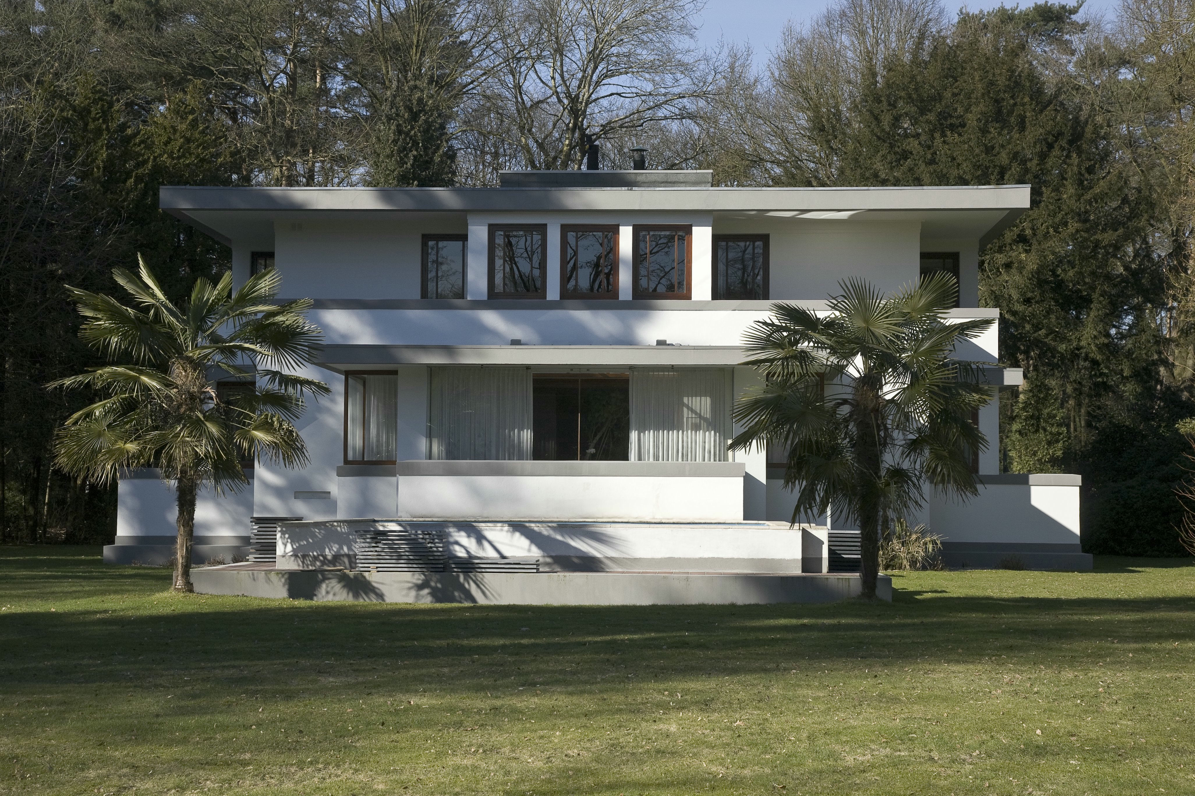 Villa Henny: Overzicht gezien vanaf de weg (opmerking: Gefotografeerd voor Wegh der Weegen, ontwikkeling van de Amersfoortseweg 1647-2010)